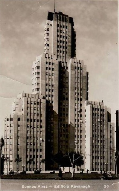 Edificio Kavanagh, visto desde la Plaza San Martín hacia 1937